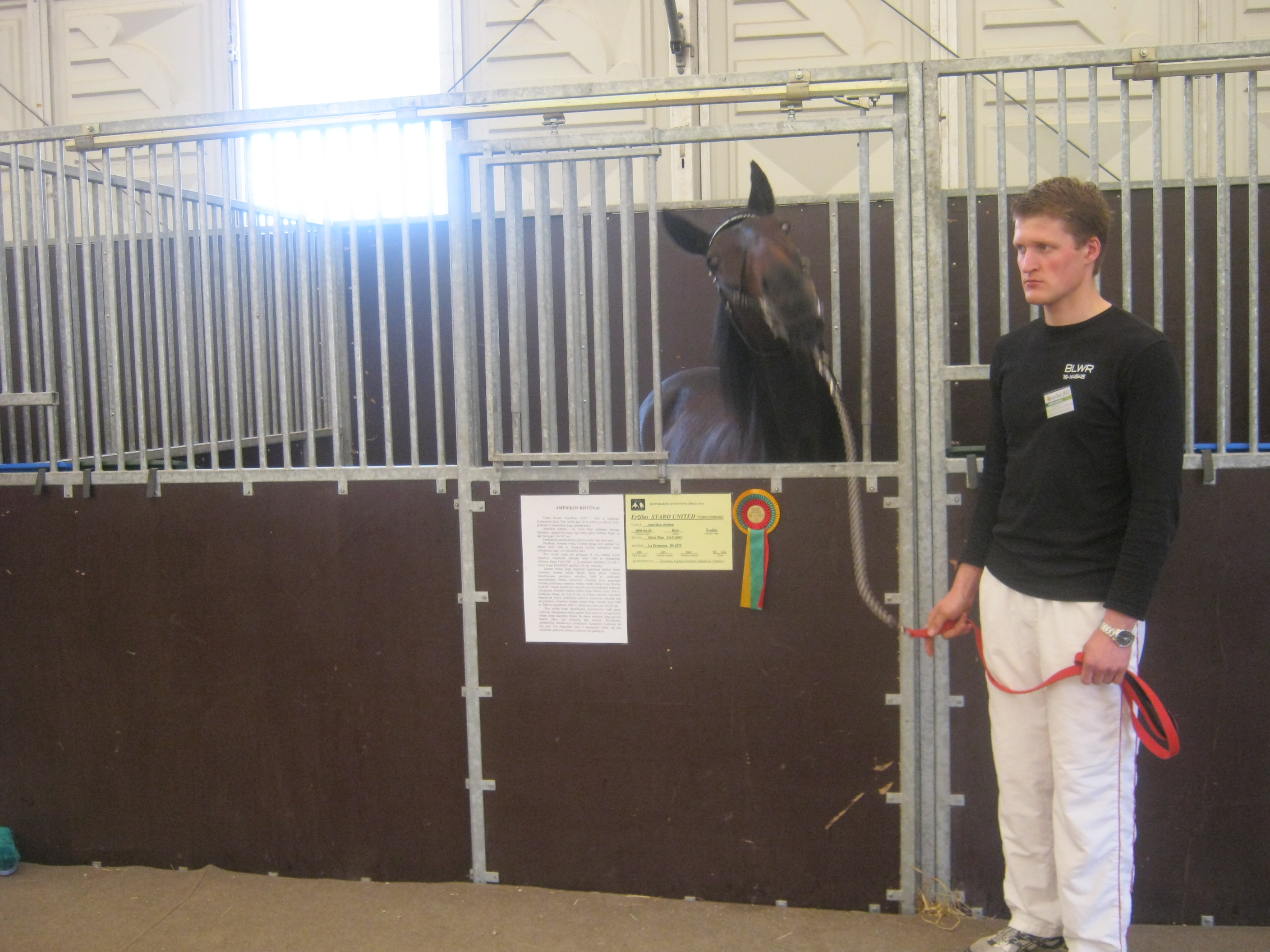 Vardas: STARO UNITED, Lytis: Eržilas, Veislė: Amerikos Ristūnai, Spalva: bėra, Gimimo data: 2000.04.26